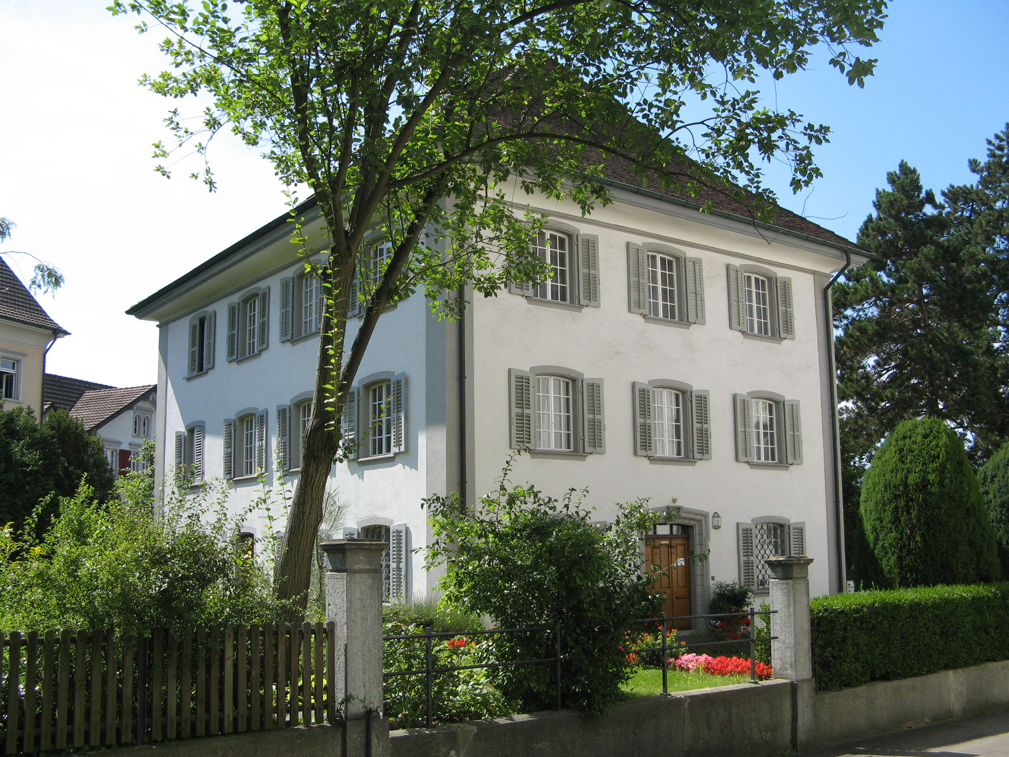 Römisch-katholisches Pfarrhaus Wohlen